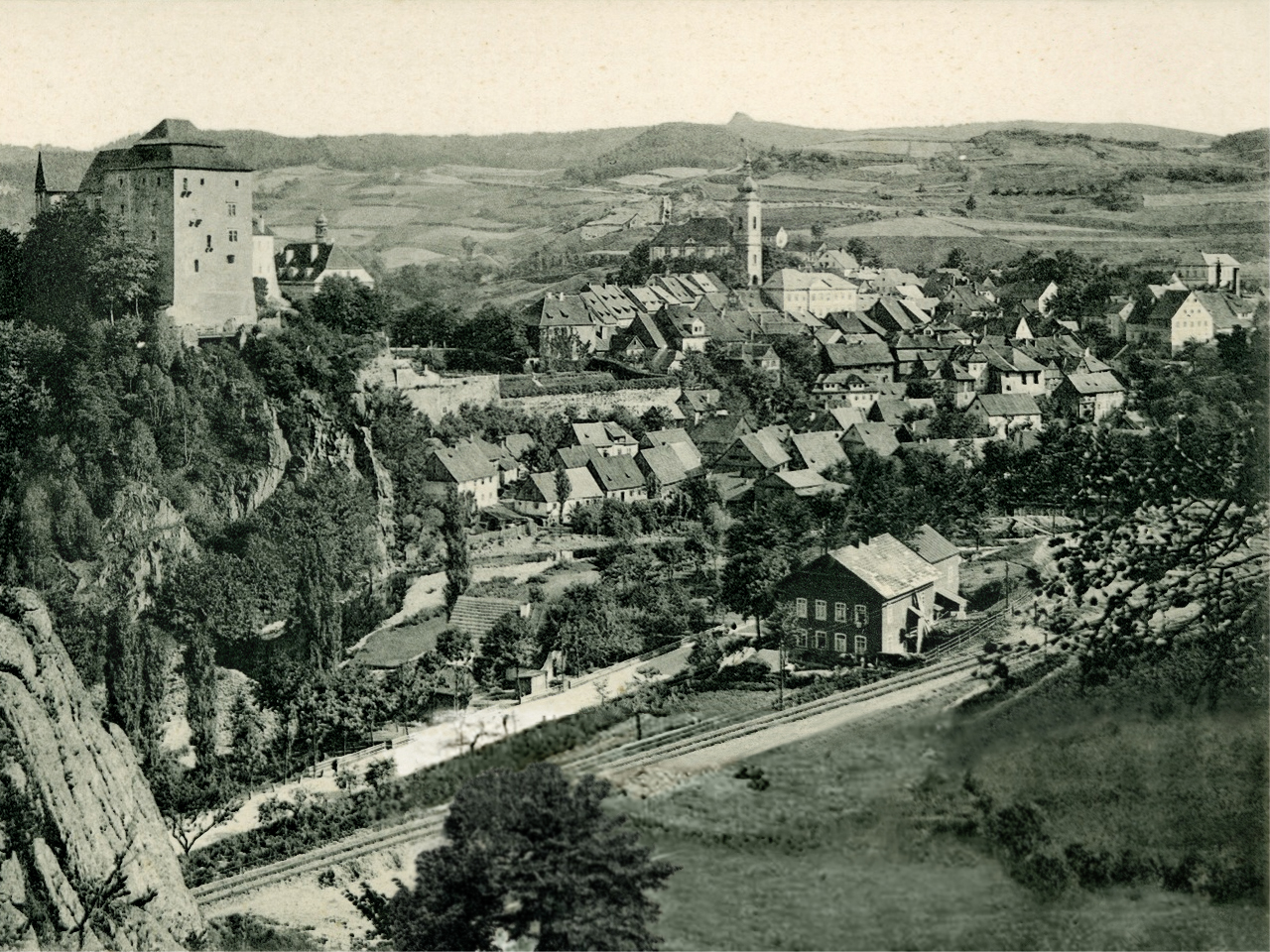 Petschau; Blick auf Petschau This postcard is from publisher Brück & Sohn in Meißen ( This postcard has a unique number 01267 and is available in a higher resolution at the publisher. This images was uploaded in a cooperation project between Wikipedians and the publisher.